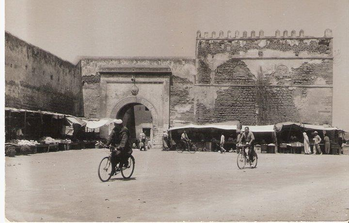 borj bab sebta 1940-50